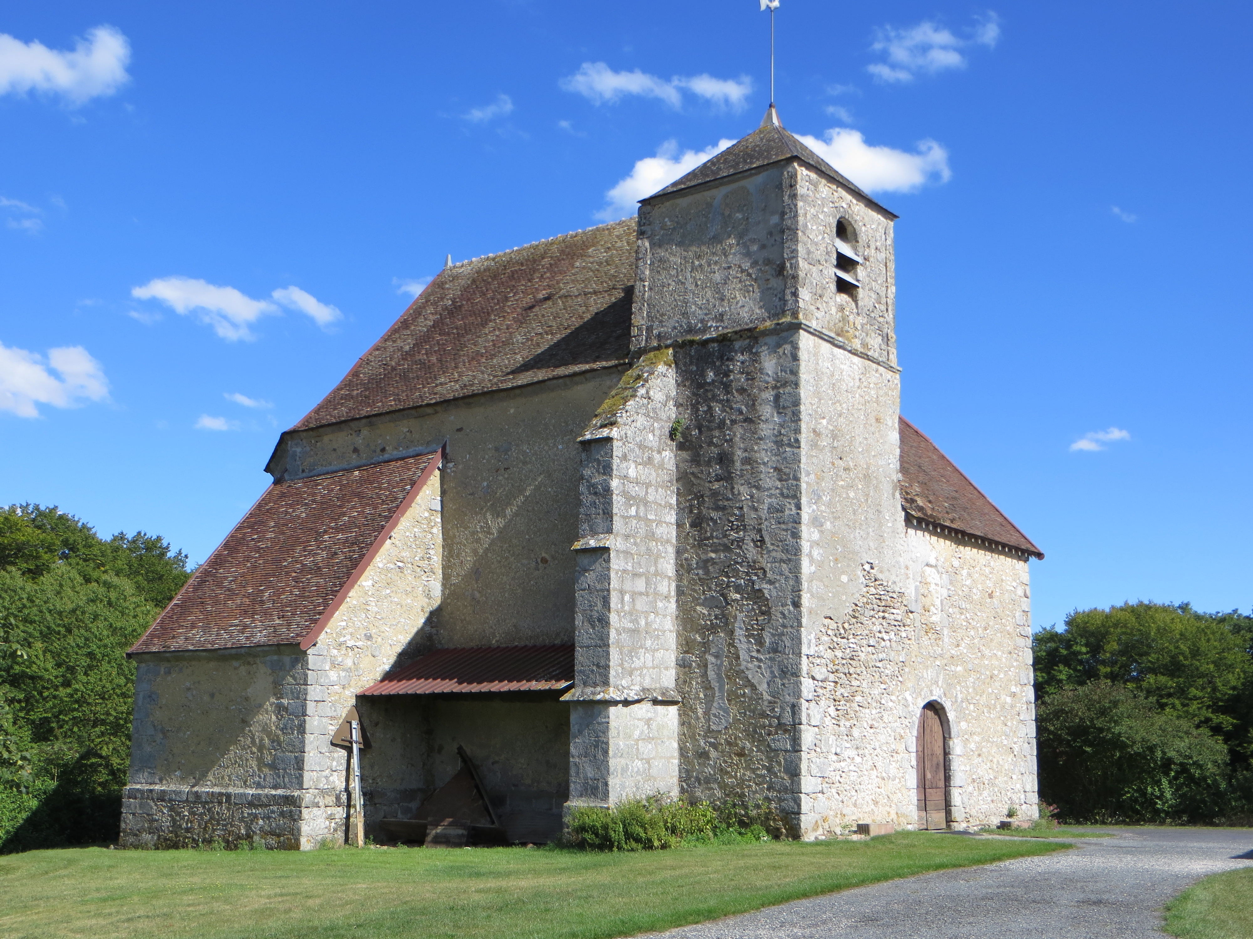 Vue générale de l'église